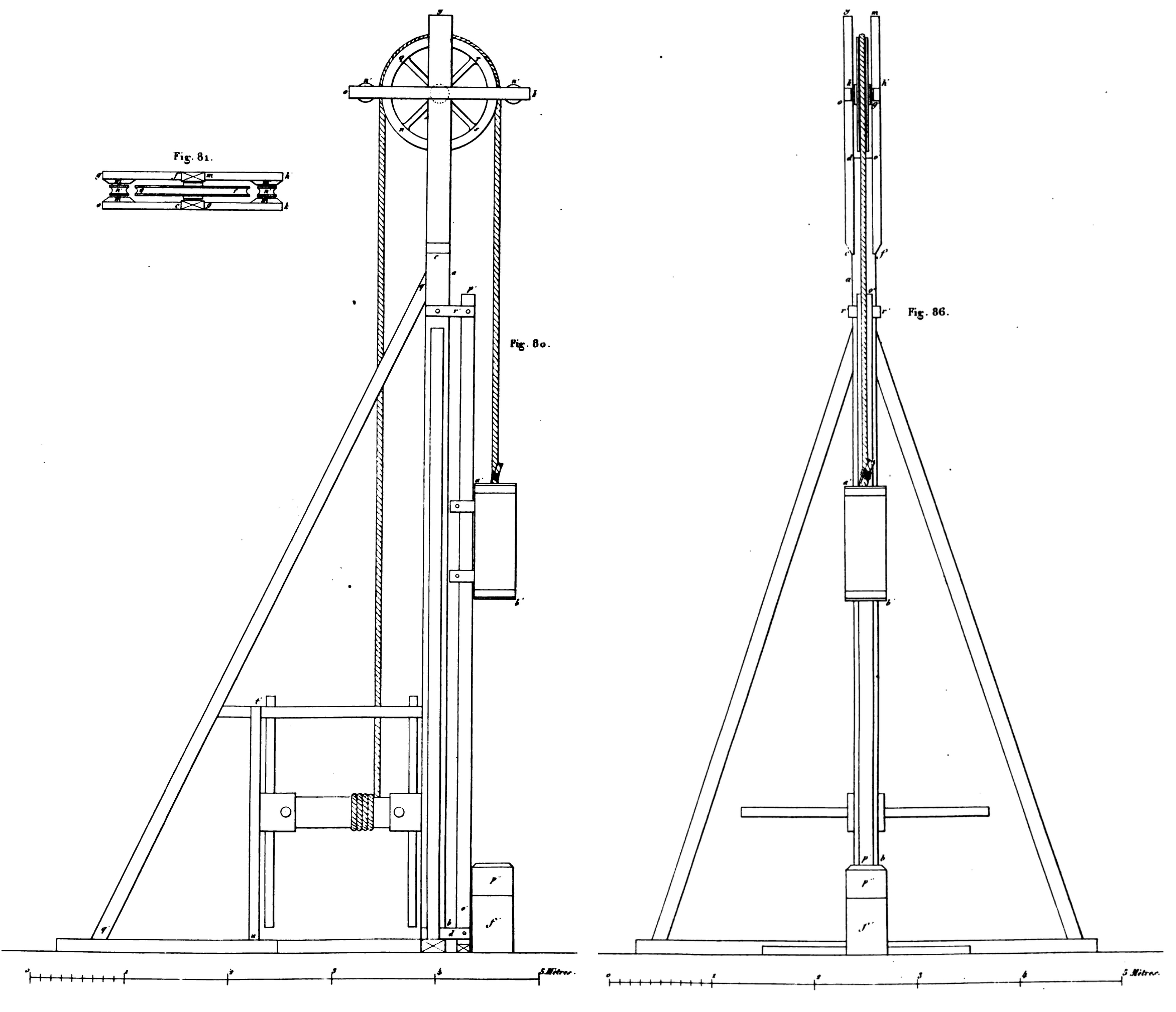 Image extraite de l'ouvrage Traité sur les puits artésiens ou sur les différentes espèces de terrains dans lesquels on doit rechercher des eaux souterraines afin d'illustrer les techniques utilisées au XIXème siècle afin d'exécuter des forages, que ce soit pour rechercher de l'eau, ou de la houille. L'image représente une vue de profil puis une vue de face d'une « machinerie » destinée à exécuter des forages. Utilisée dans le Nord-Pas-de-Calais pour effectuer des puits artésiens, ce type de machine peut très bien forer le sol afin de rechercher le charbon. En ce sens, cette « machinerie » utilisée dans les années 1820 peut très bien être en vigueur entre 1837 et 1844 pour effectuer des sondages de recherche de charbon. La Compagnie d'Hasnon a effectué neuf sondages dans les communes d'Hasnon et Wallers. Bien qu'ils n'aient pas pu permettre la découverte de veines exploitables de charbon, ce sondages ont pu définir une limite septentrionale du bassin minier du Nord-Pas-de-Calais.